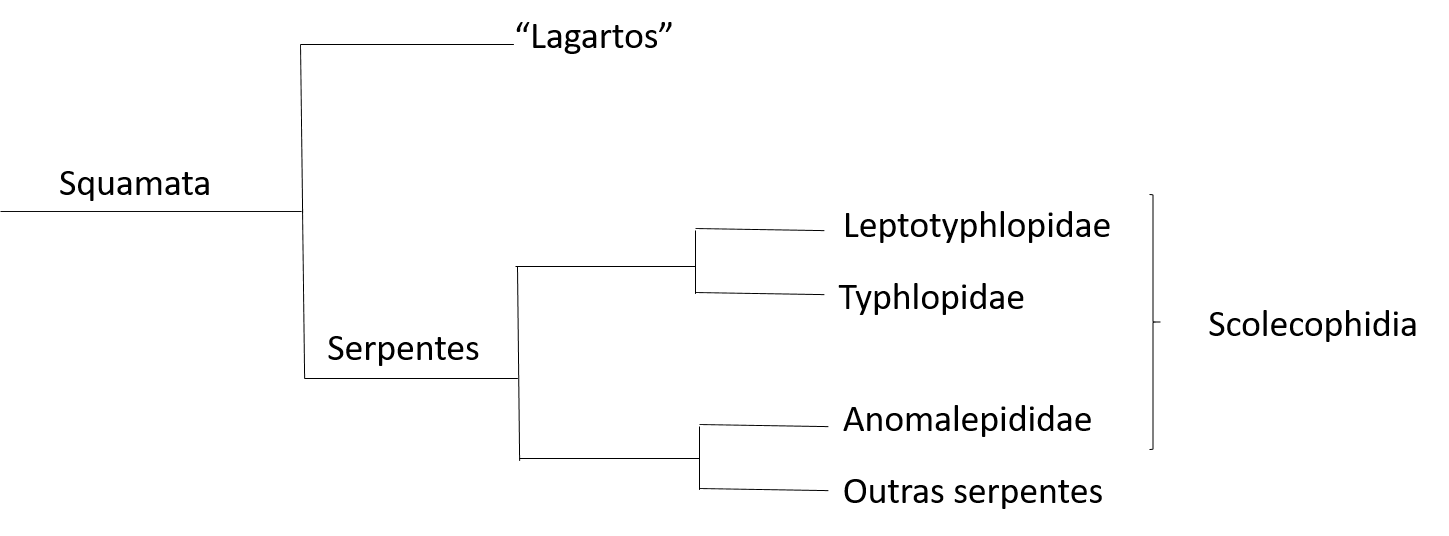 Relação filogenética entre os grupos de squamatas focalizando principalmente a questão do desenvolvimento da visão. Consideramos Scolecophidia como parafilético e o ancestral das cobras sendo desprovido de genes para visão a cores e com um baixo desenvolvimento da estrutura dos olhos.